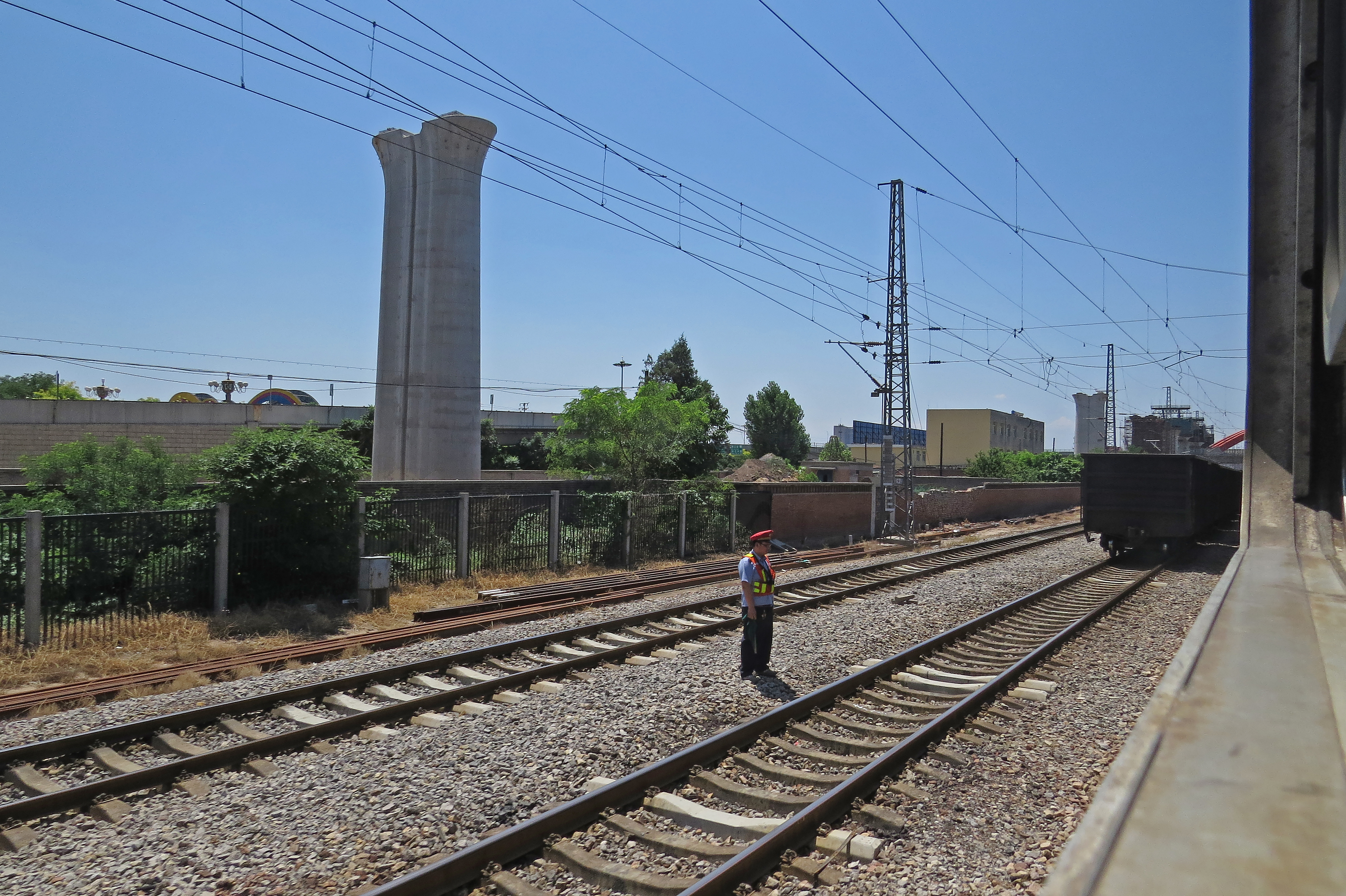 石德铁路良村站与石济客专工地